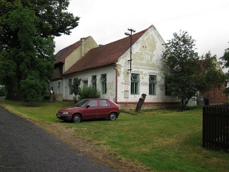 Bývalý hostinec, Vysoká 1, Vysoká (Javorník).